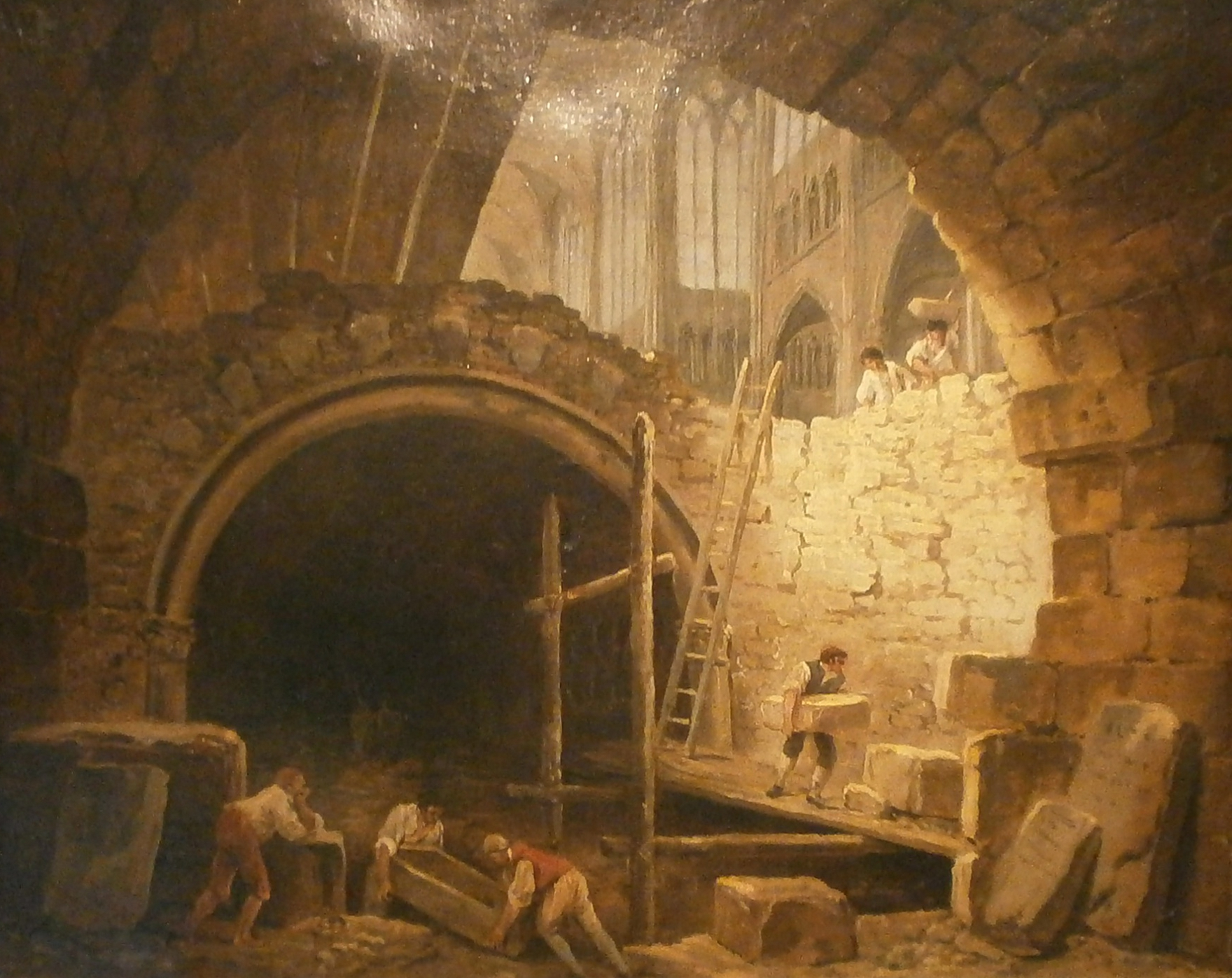 La violation des caveaux des rois dans la basilique de Saint-Denistitle QS:P1476,fr:"La violation des caveaux des rois dans la basilique de Saint-Denis" label QS:Lfr,"La violation des caveaux des rois dans la basilique de Saint-Denis"